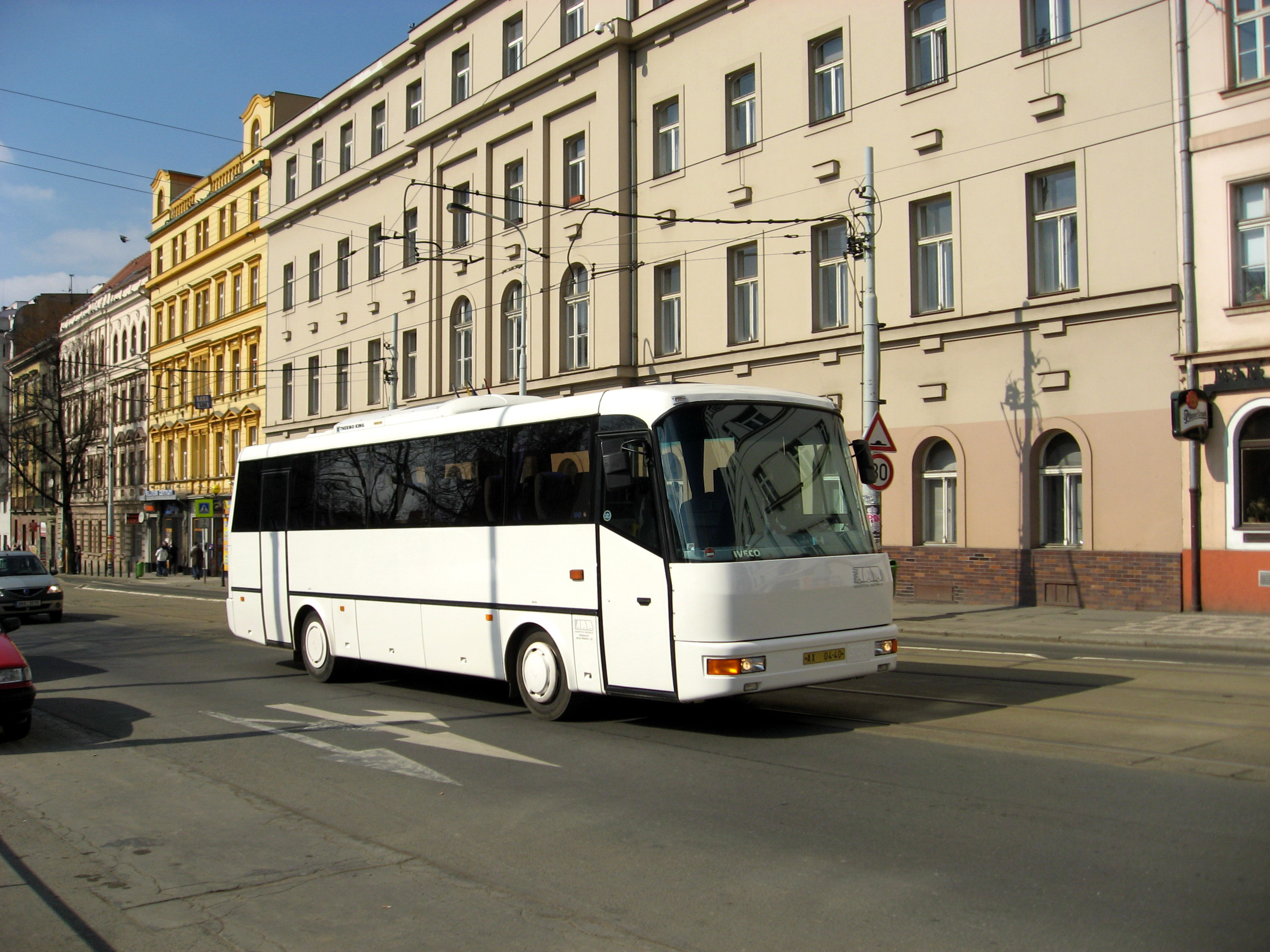 Autobus SOR LC 9,5 na Seifertově ulici u zastávky Husinecká